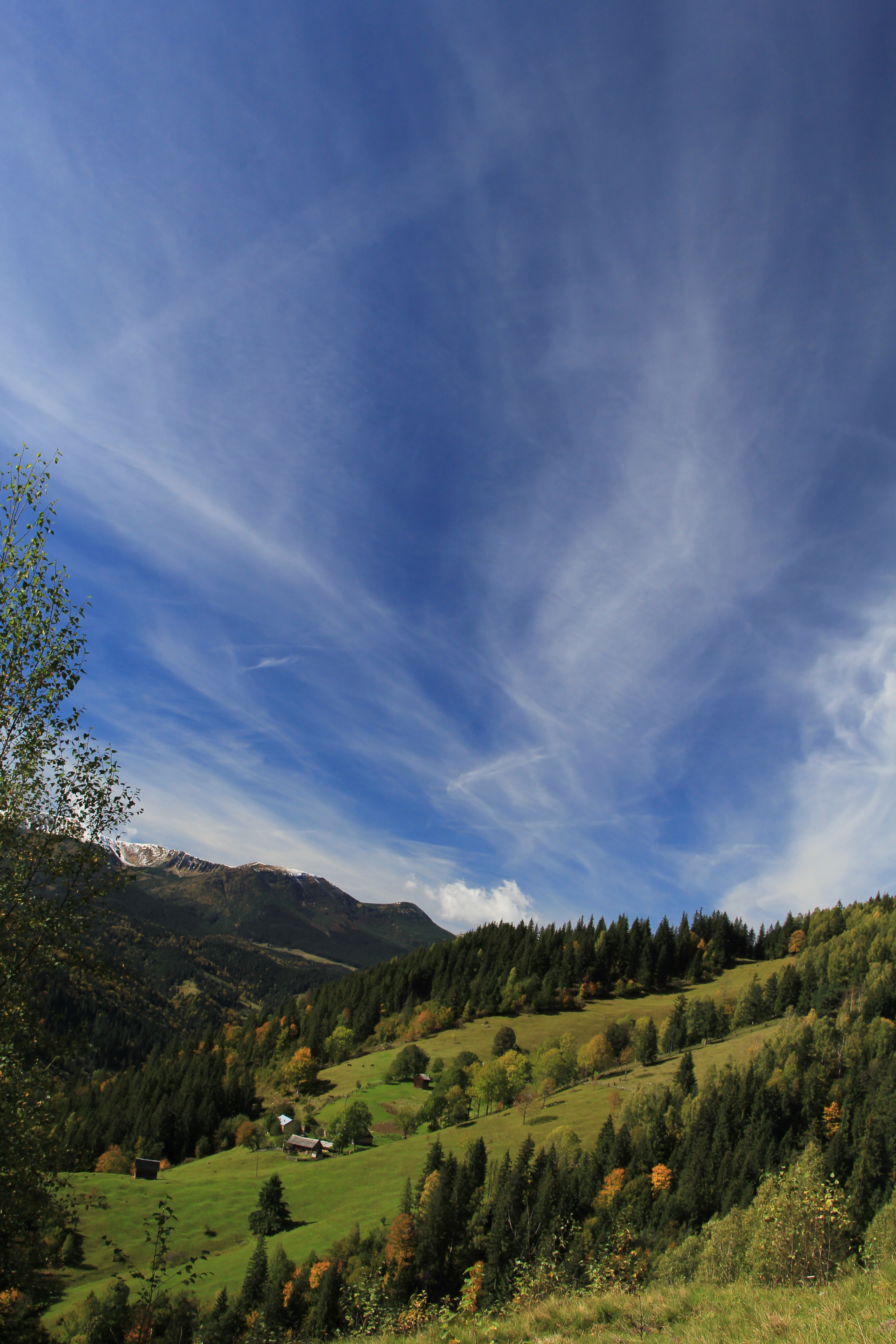 Карпатський, Яремчанська міська рада, Верховинський район, Надвірнянський район